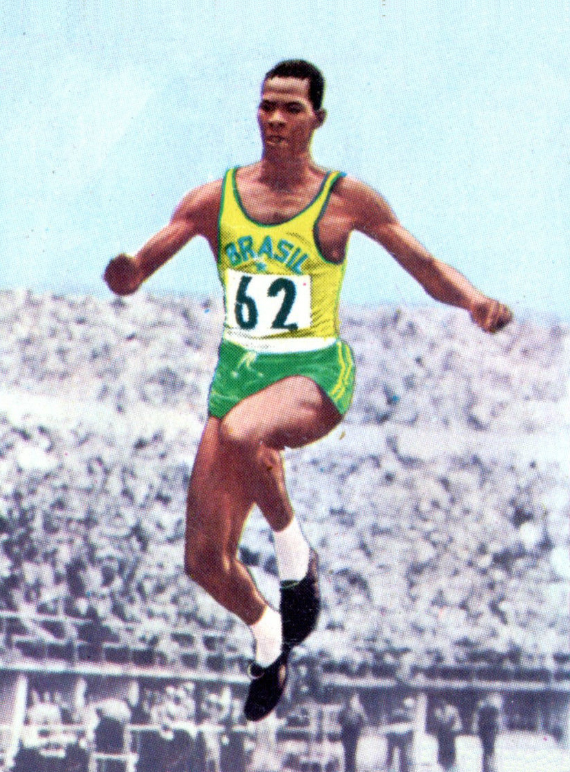 OLYMPIA 1972 n.184 FERREIRA DA SILVA BRASILE 1956 Figurina Sticker Panini (NEW)